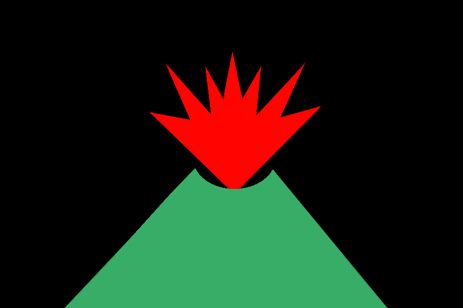 Bandera de las tropas de italianos bajo el mando de Garibaldi en el sitio de Montevideo. Trabajo propio basado en la descripción hecha por Domingo Faustino Sarmiento de la bandera de las tropas de Garibaldi en Montevideo. pruxo 2007